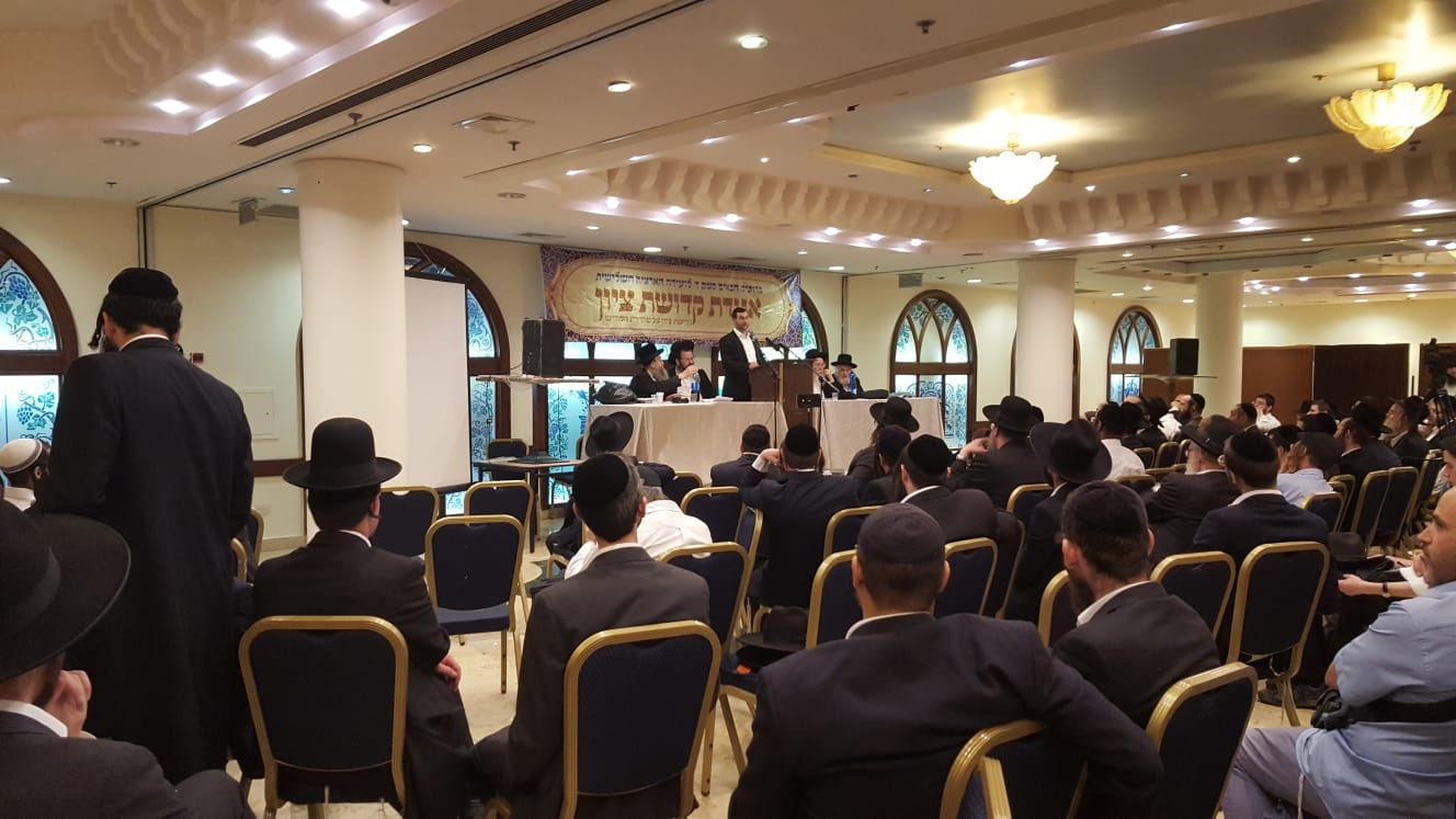 הוועידה הארצית השלישית של אגודת קדושת ציון, אולמי פארימה פאלאס, ליל כ"ו באייר תשע"ט על הבמה נראים (מימין לשמאל): הרב יואל שוורץ, הרב יצחק ברנד, נואם לא ידוע, הרב יהודה אפשטיין, הרב מנחם מנדל טוביאס